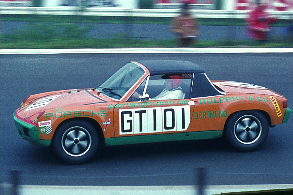 Porsche 914-6 (mit 6-Zylinder-Motor) beim 1000-km-Rennen auf dem Nürburgring (eingangs Südkehre).